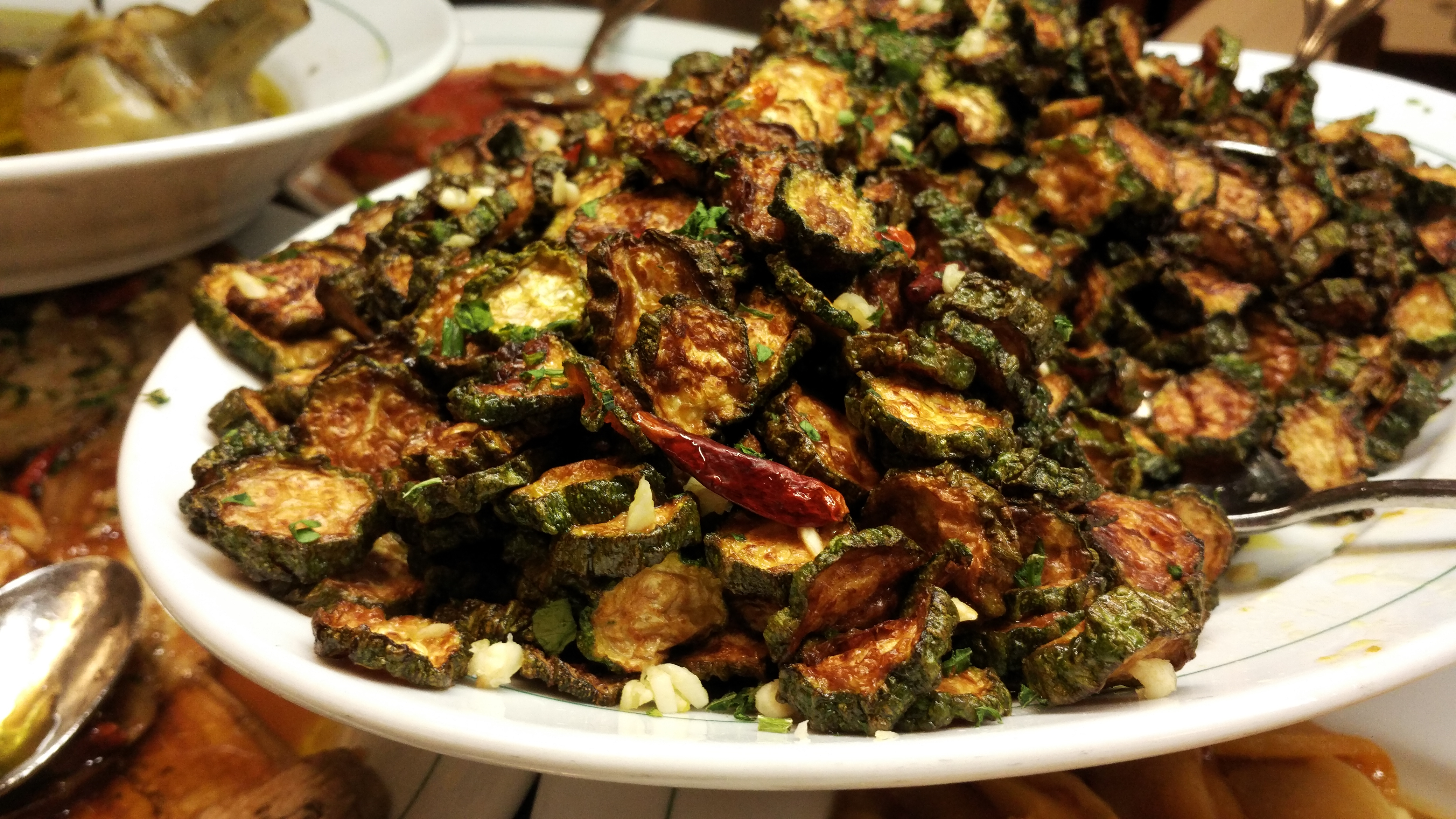 Zucchini alla concia, a jewish-roman traditional recipe